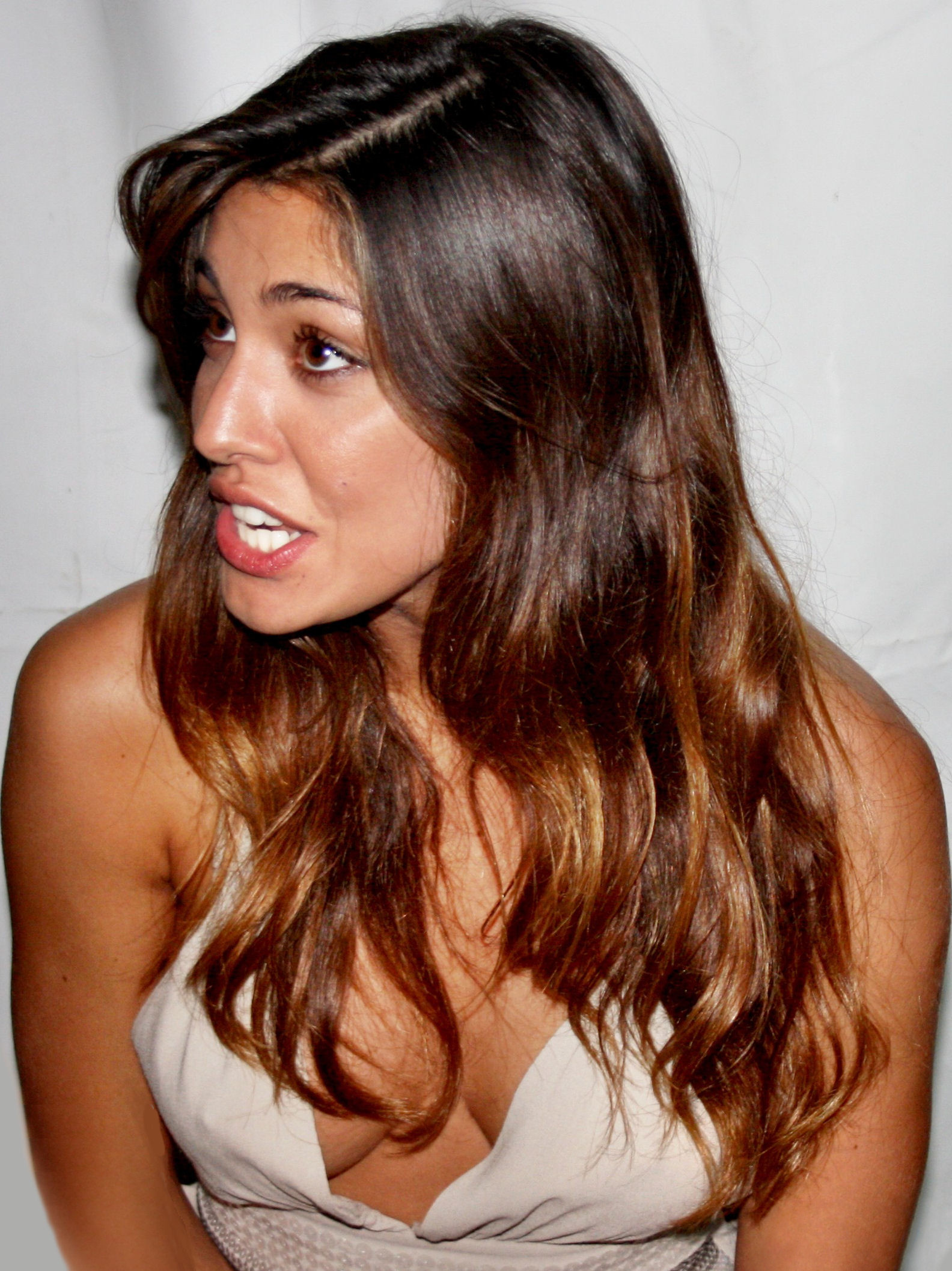 La showgirl Belen Rodriguez